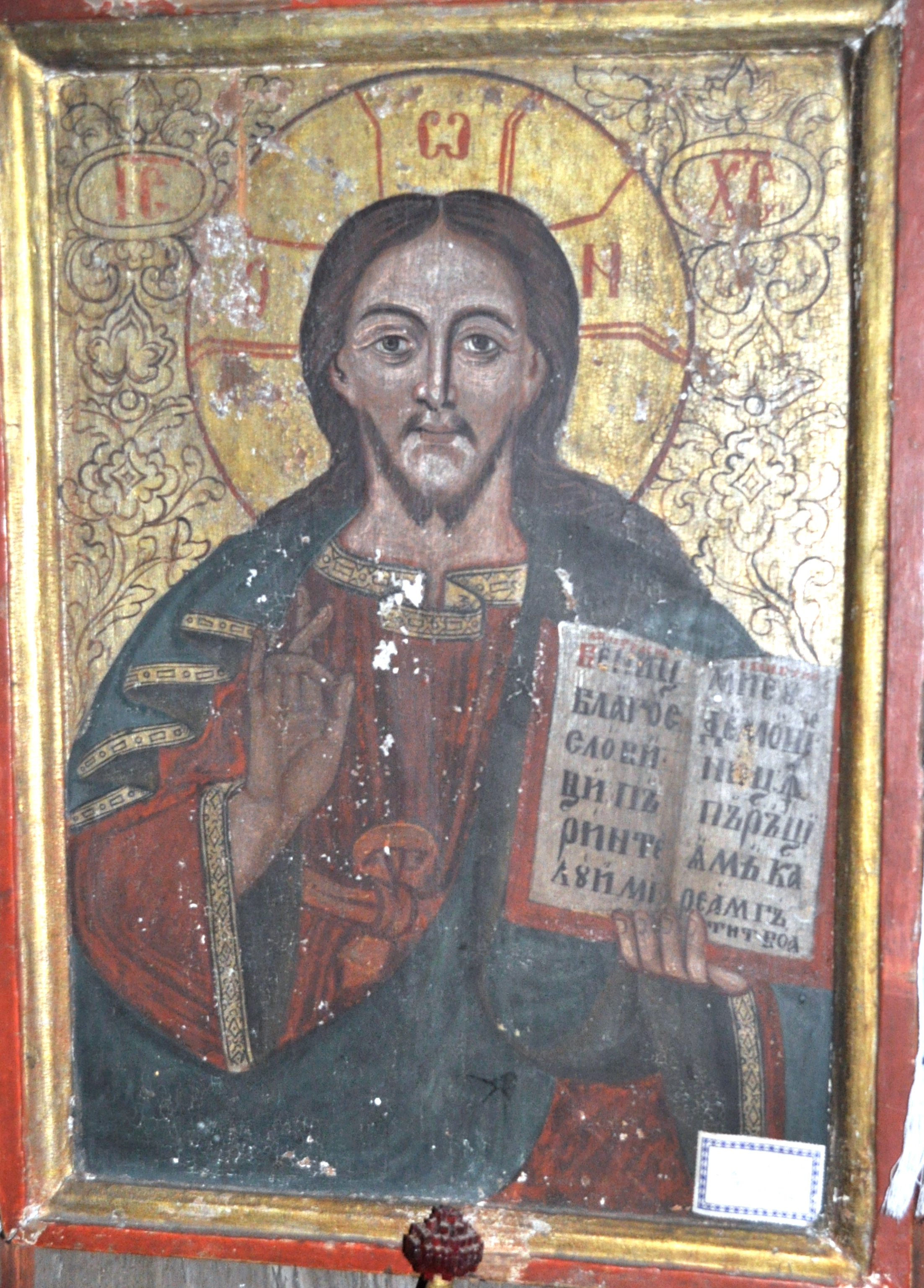 Biserica de lemn „Pogorârea Sf. Duh" din Sartăș, județul Alba